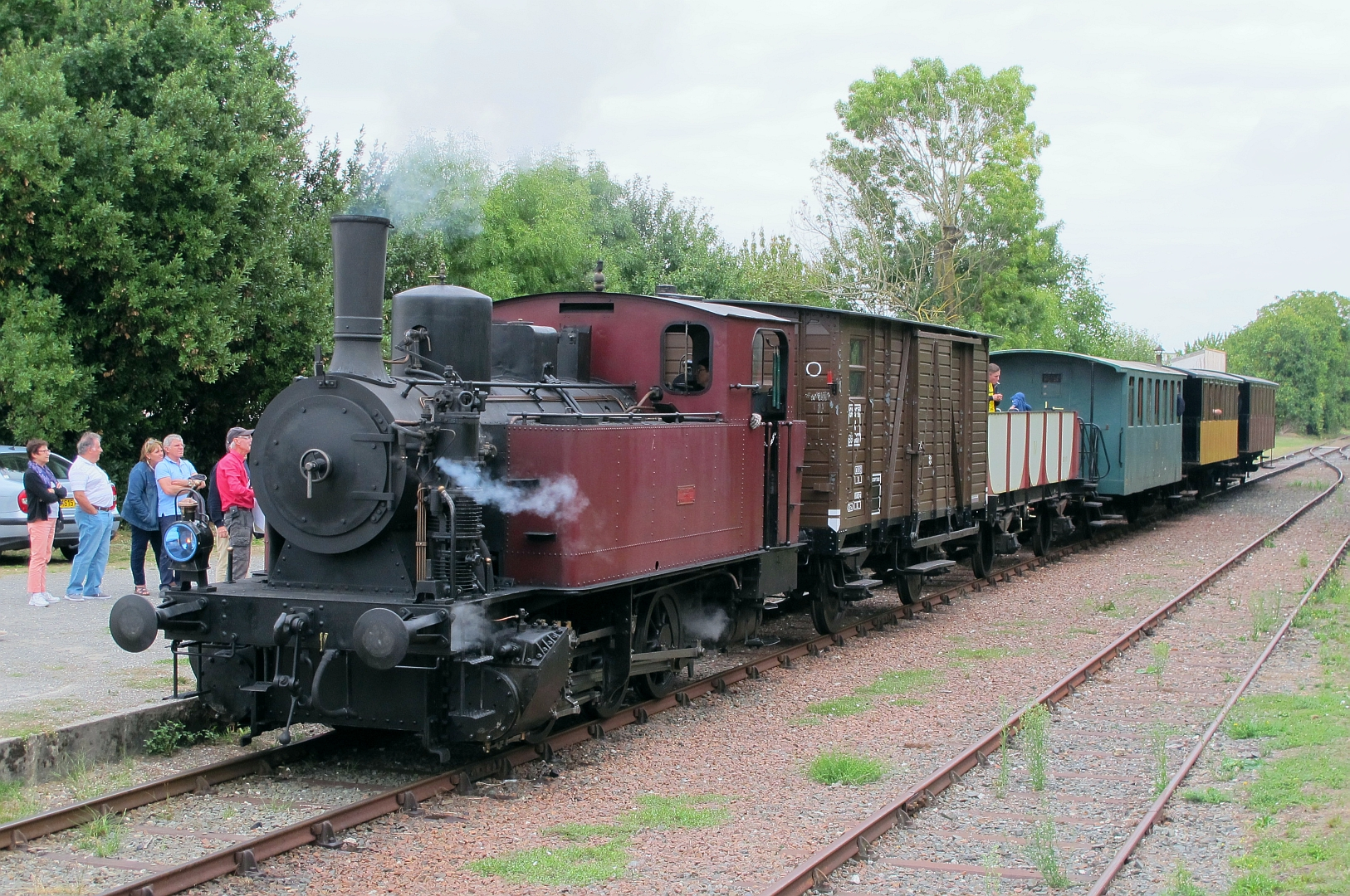 Un train à vapeur du Train des Mouettes en gare de Mornac-sur-Seudre le 18 septembre 2016.